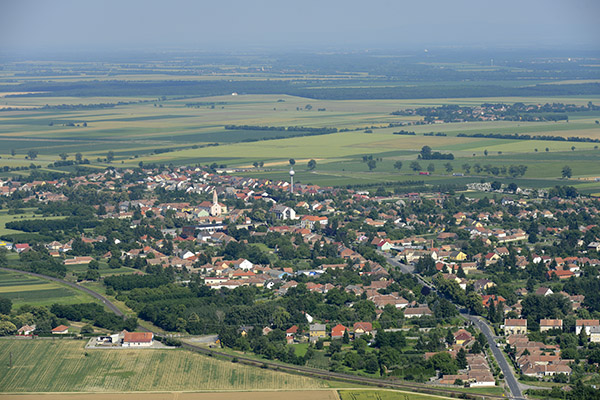 Beled látképe madártávlatból